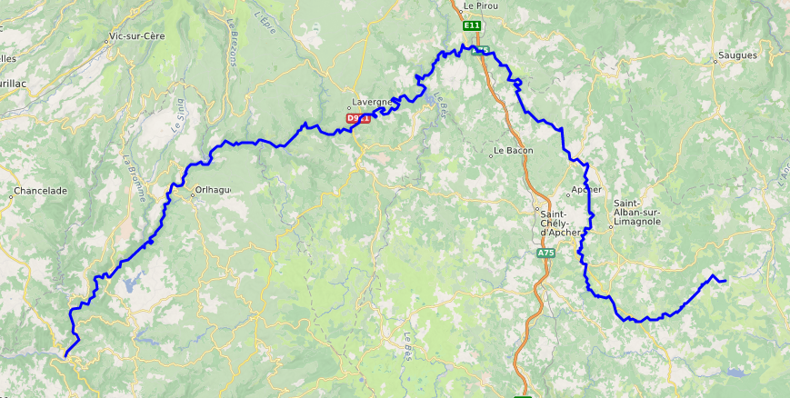 carte réalisée sur umap This map may be incomplete, and may contain errors. Don't rely solely on it for navigation.